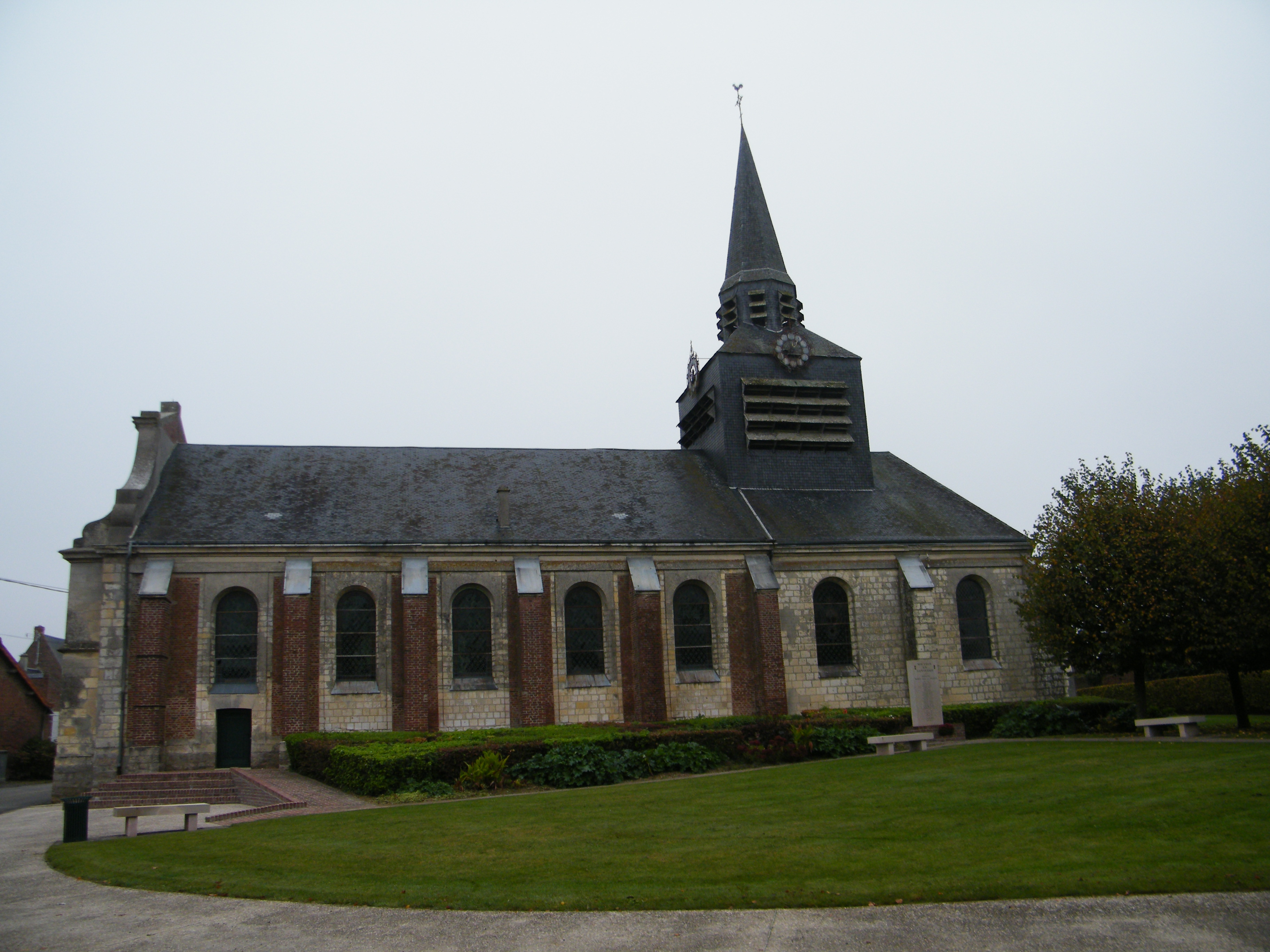 église.